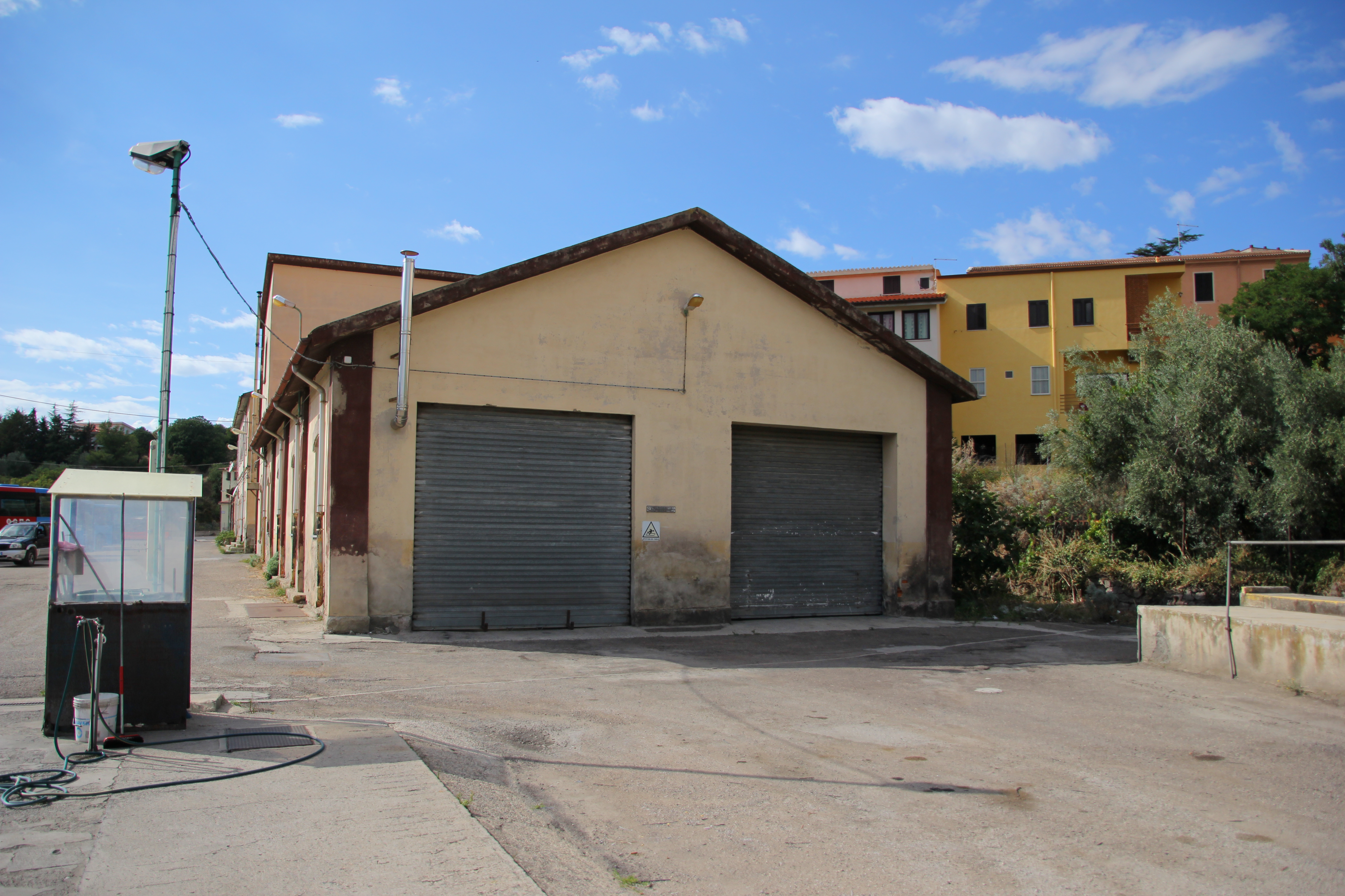 Ozieri - La vecchia stazione ferroviaria